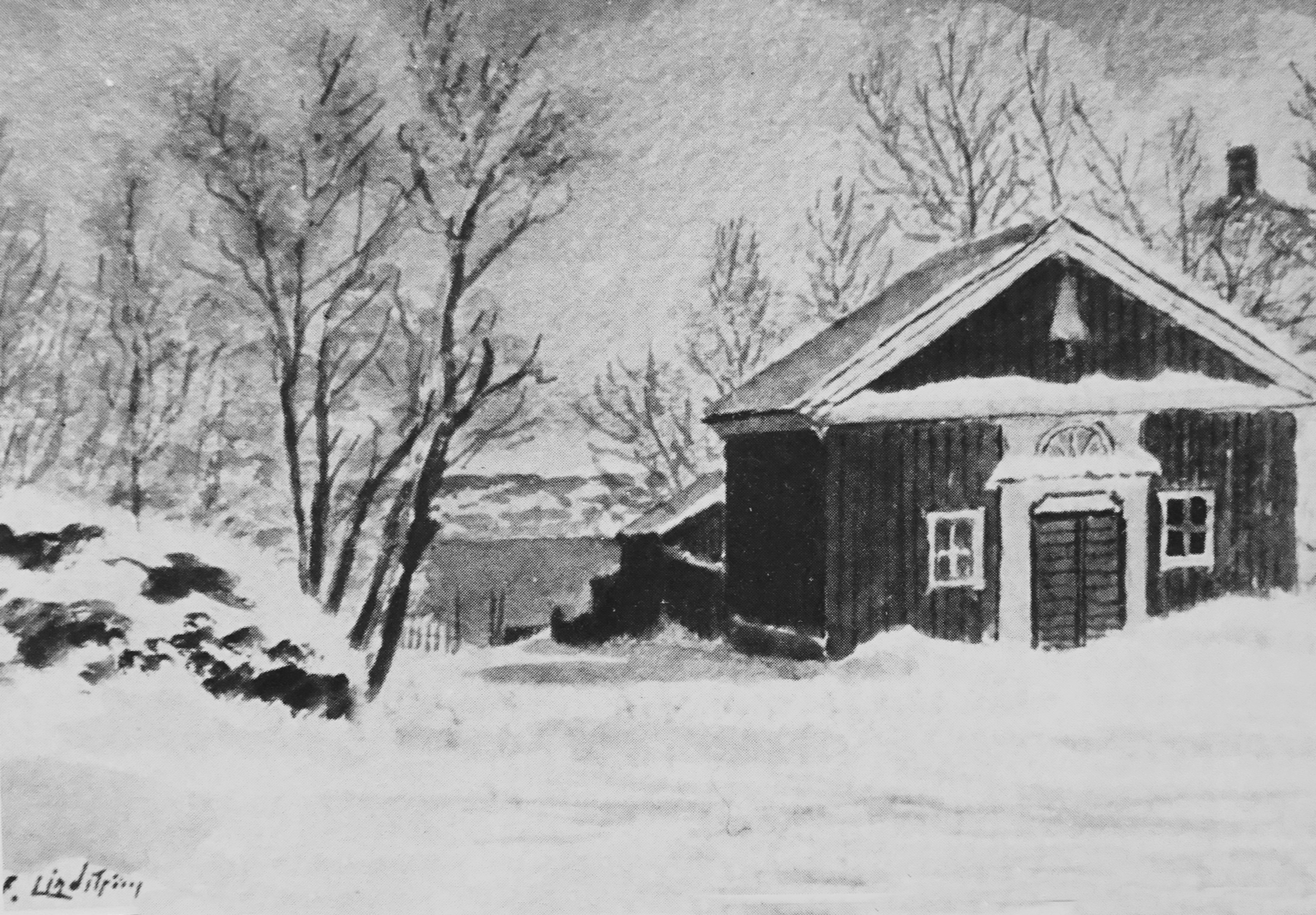 Mariebergs malmgård, grindstugan i början av 1900-talet, målning av Frans Lindström